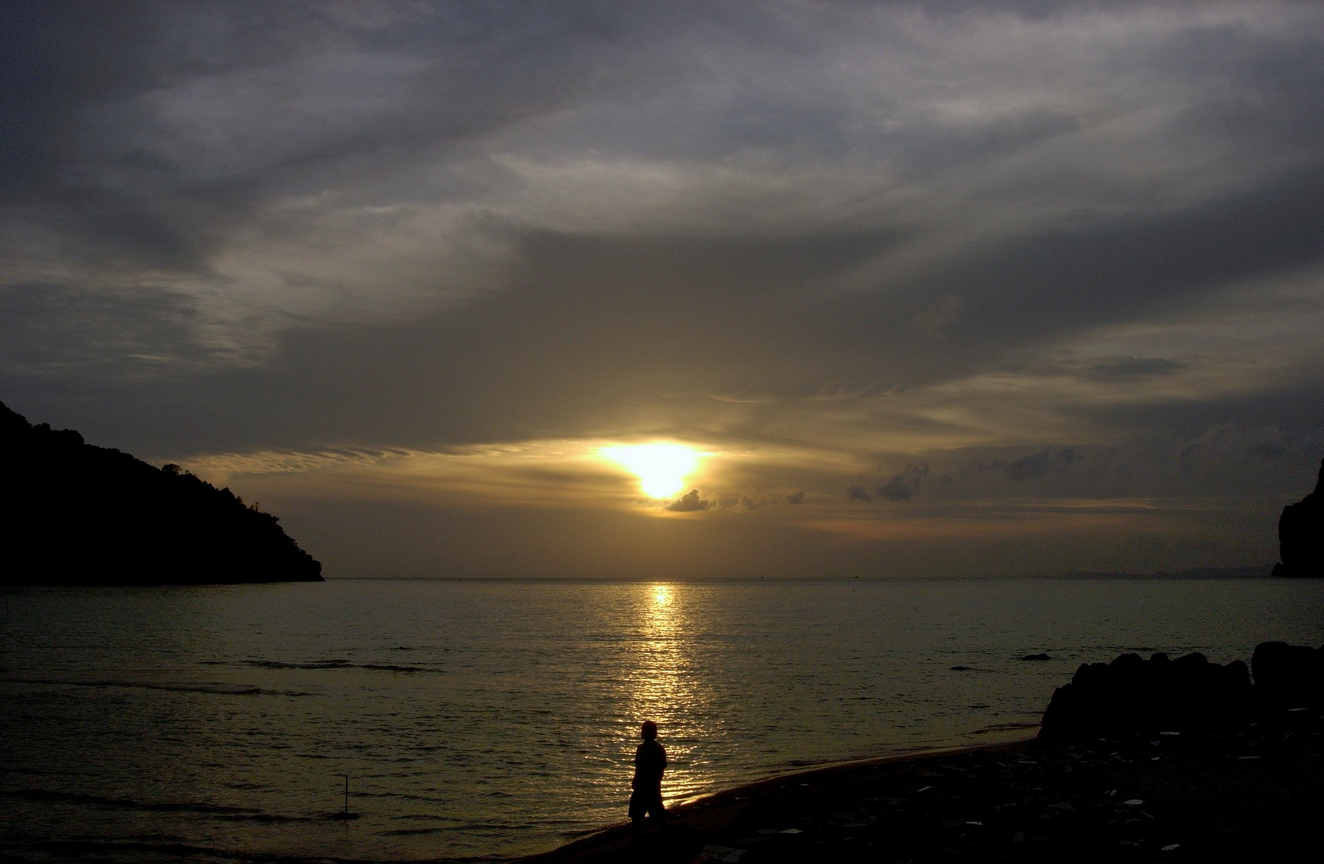 koh phi phi sunset